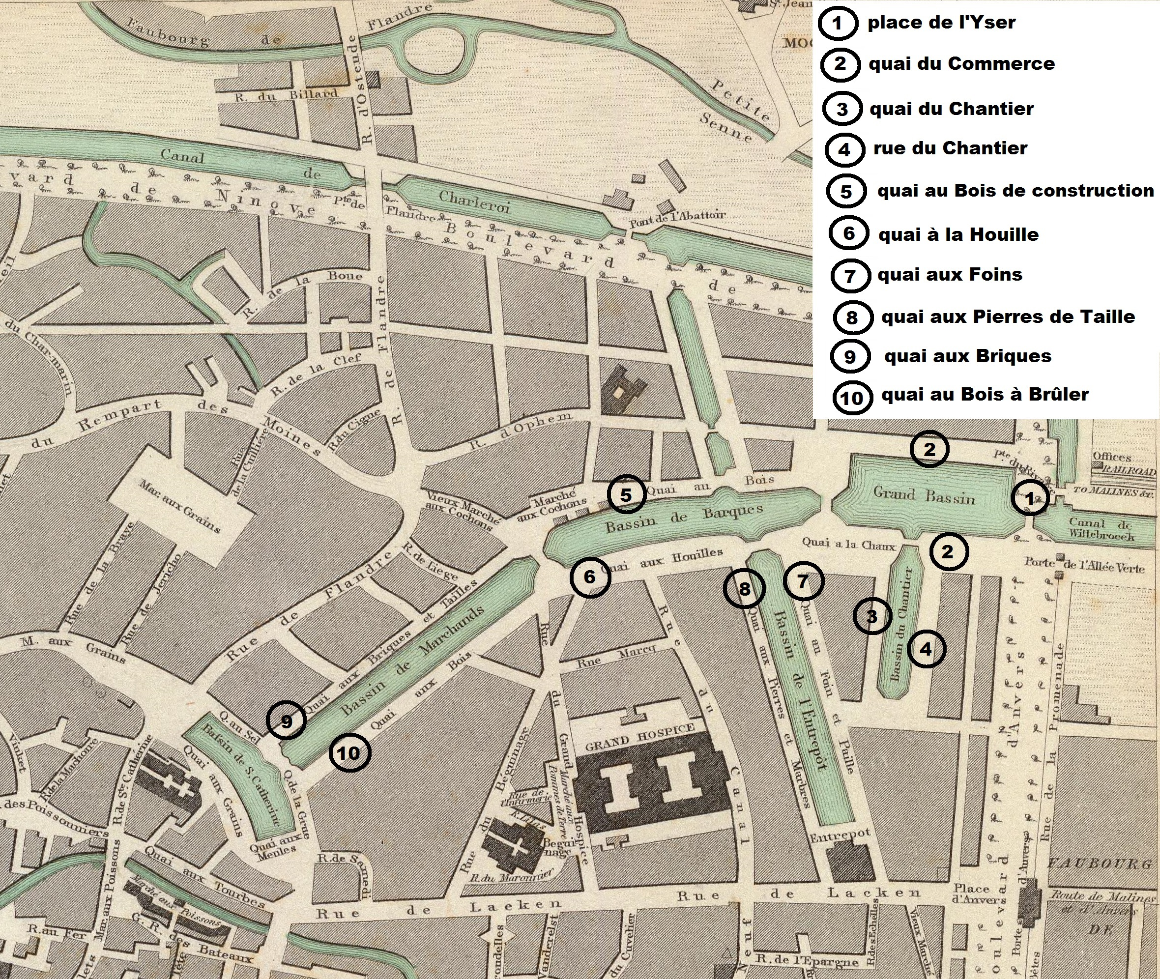 Quais de l'ancien port de Bruxelles avec leur appellation actuelle